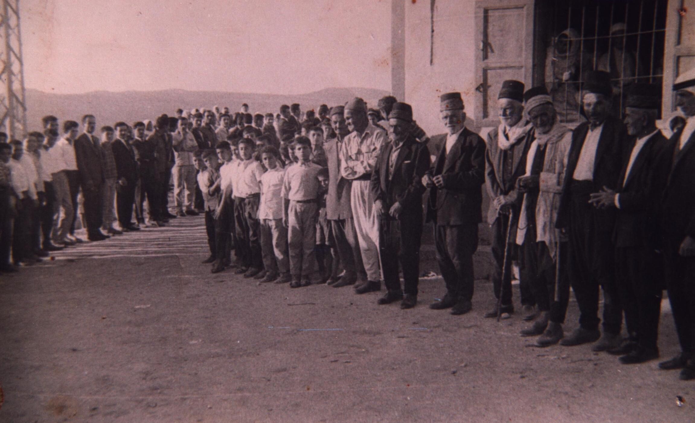 أعيان بلدة عبا - في الستينات